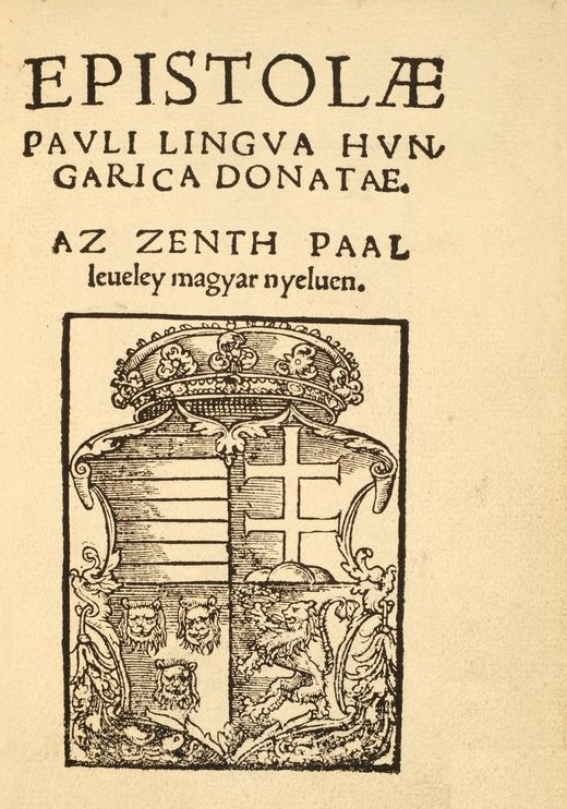 Az első teljesen magyar nyelvű, 1533-ban Krakkóban nyomtatott könyv, Komjáti Benedek bibliafordító műve, az Epistolae Pauli lingua hungarica donatae. Az zenth Paal leueley magyar nyeluen című műfordítás.